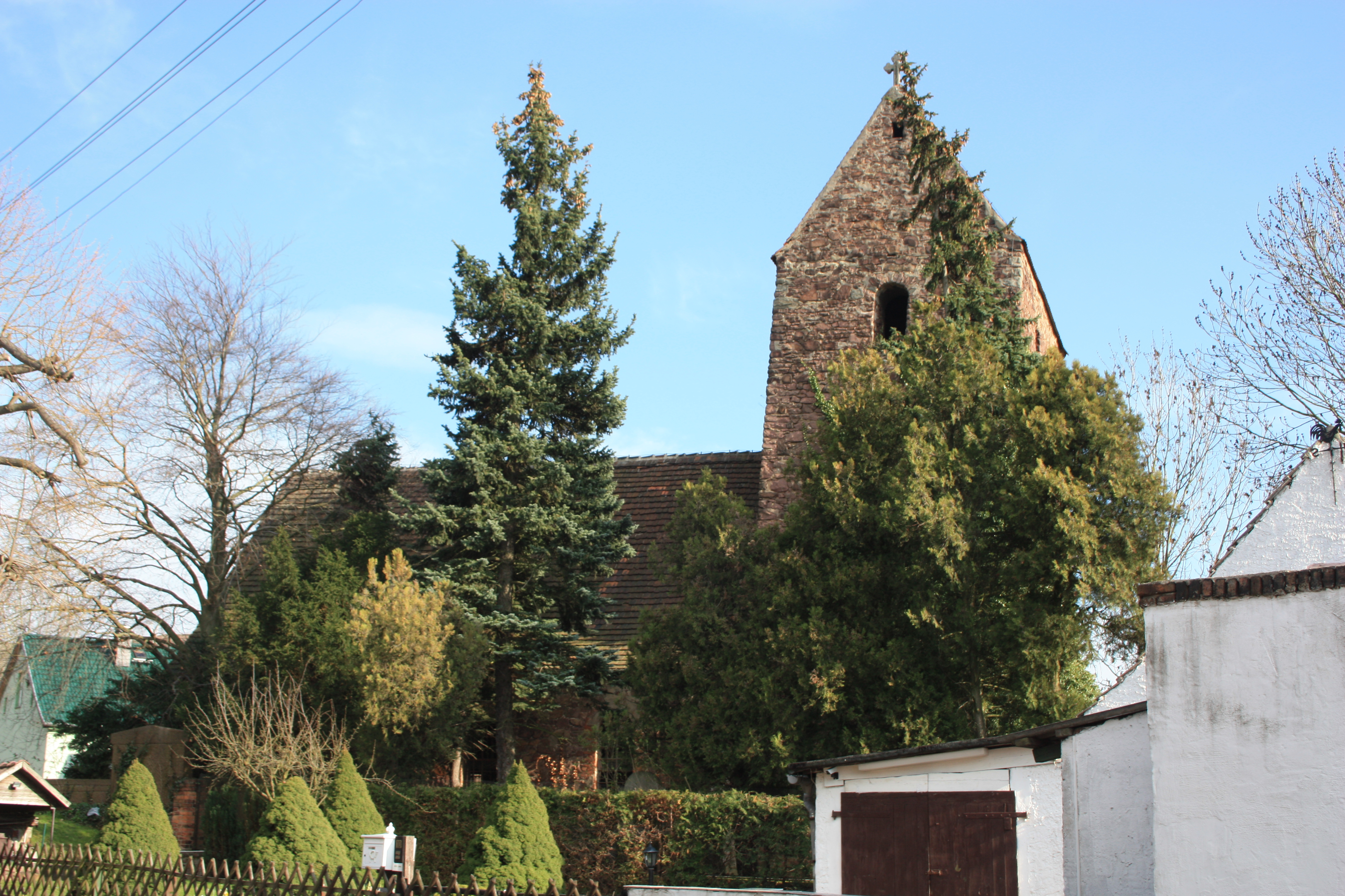 Blick von Norden auf die Dorfkirche von Lettewitz, Saalekreis